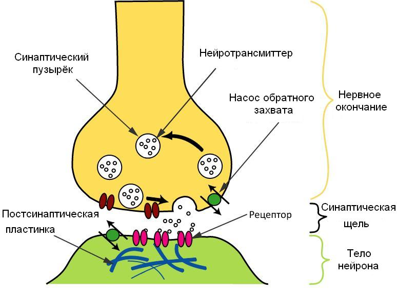 Схема процесса передачи нервного сигнала в химическом синапсе